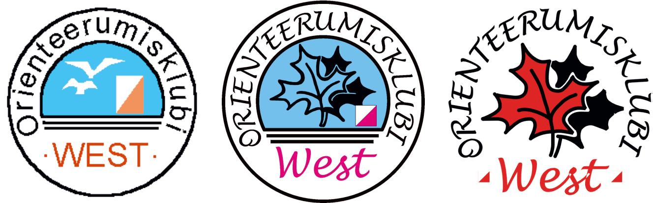 Klubi logod läbi aegade